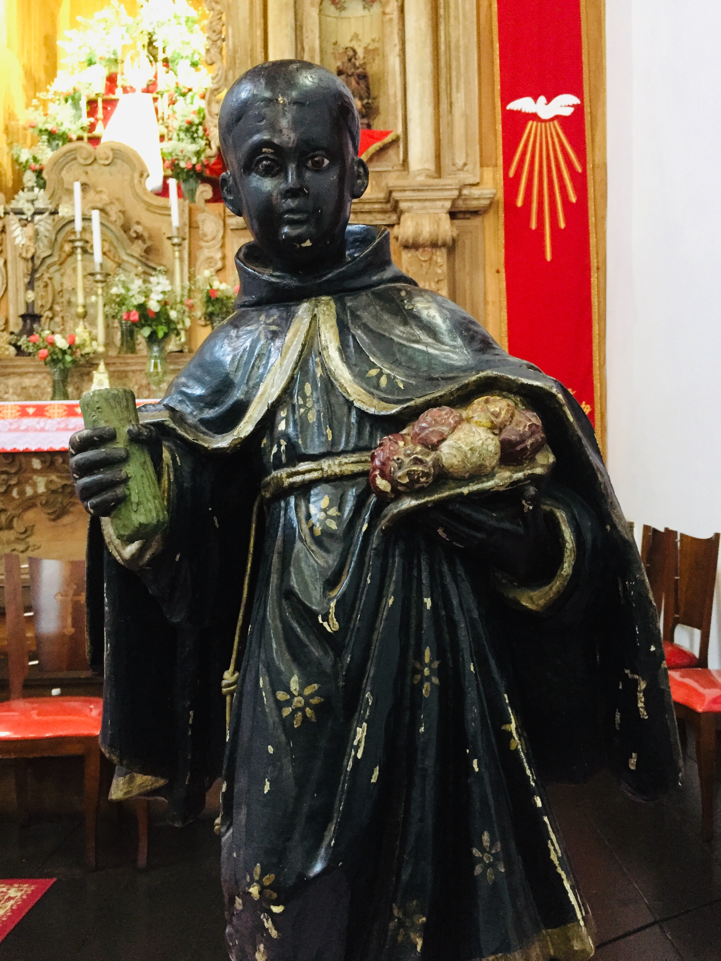 Imagem de São Benedito, peça barroca do século XVIII, antigamente venerada na Igreja do Rosário dos Pretos de Pirenópolis, peça pertencente a Irmandade São Benedito.